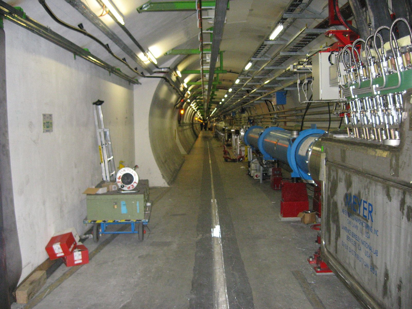 Large Hadron Collider tunnel and dipole magnets.